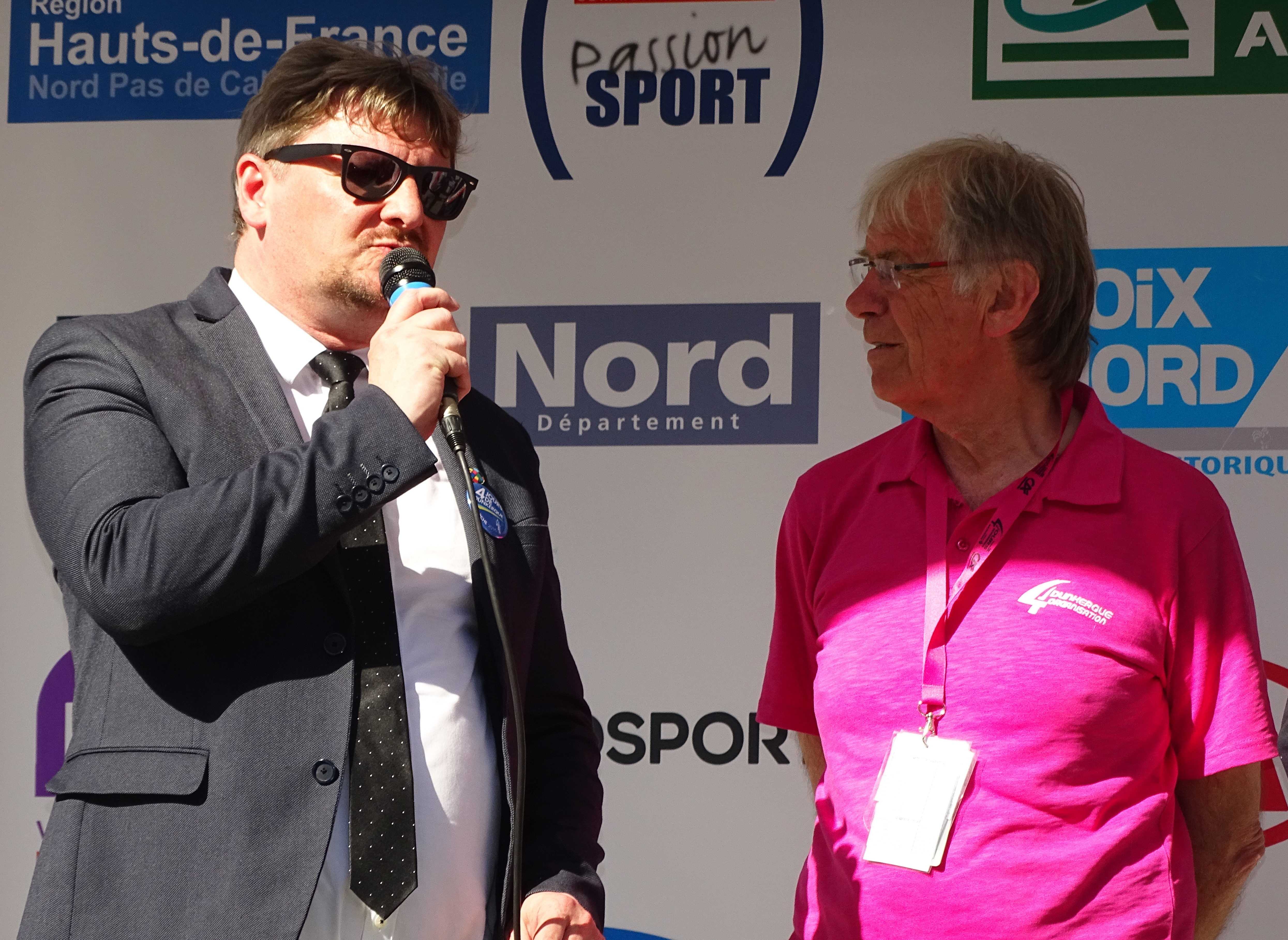 Reportage réalisé le jeudi 5 mai 2016 à l'occasion du départ et de l'arrivée de la deuxième étape des Quatre jours de Dunkerque 2016 à Aniche, Nord, Nord-Pas-de-Calais, France. Depicted people: Frédéric Delannoy and Daniel Mangeas